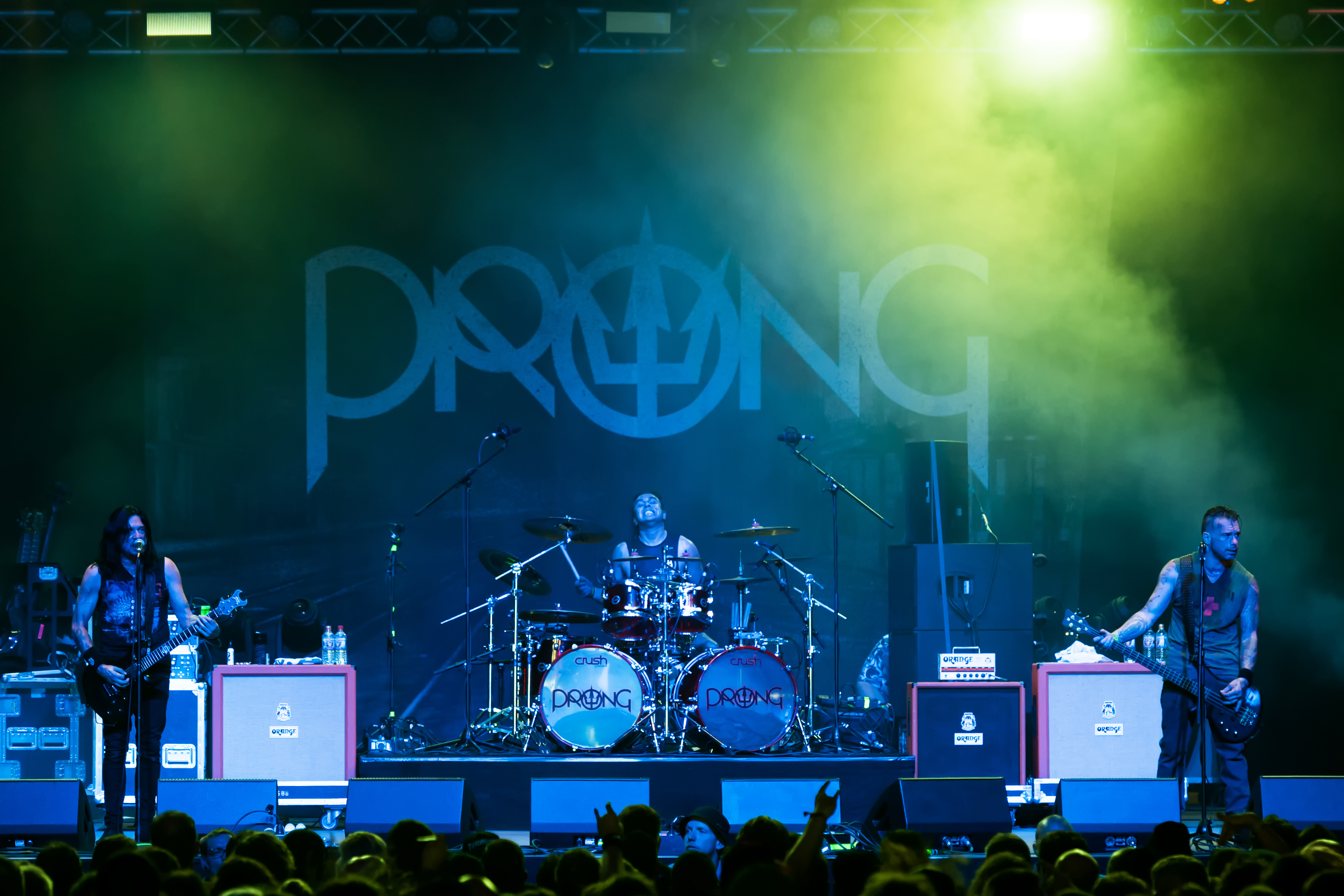 Prong beim Wacken Open Air 2017